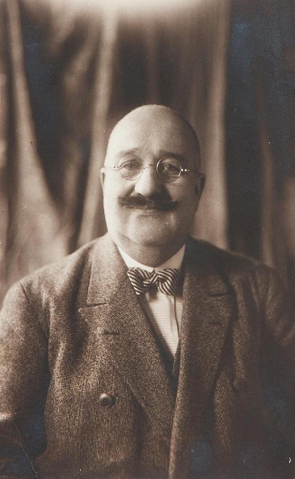 Sevket Dağ